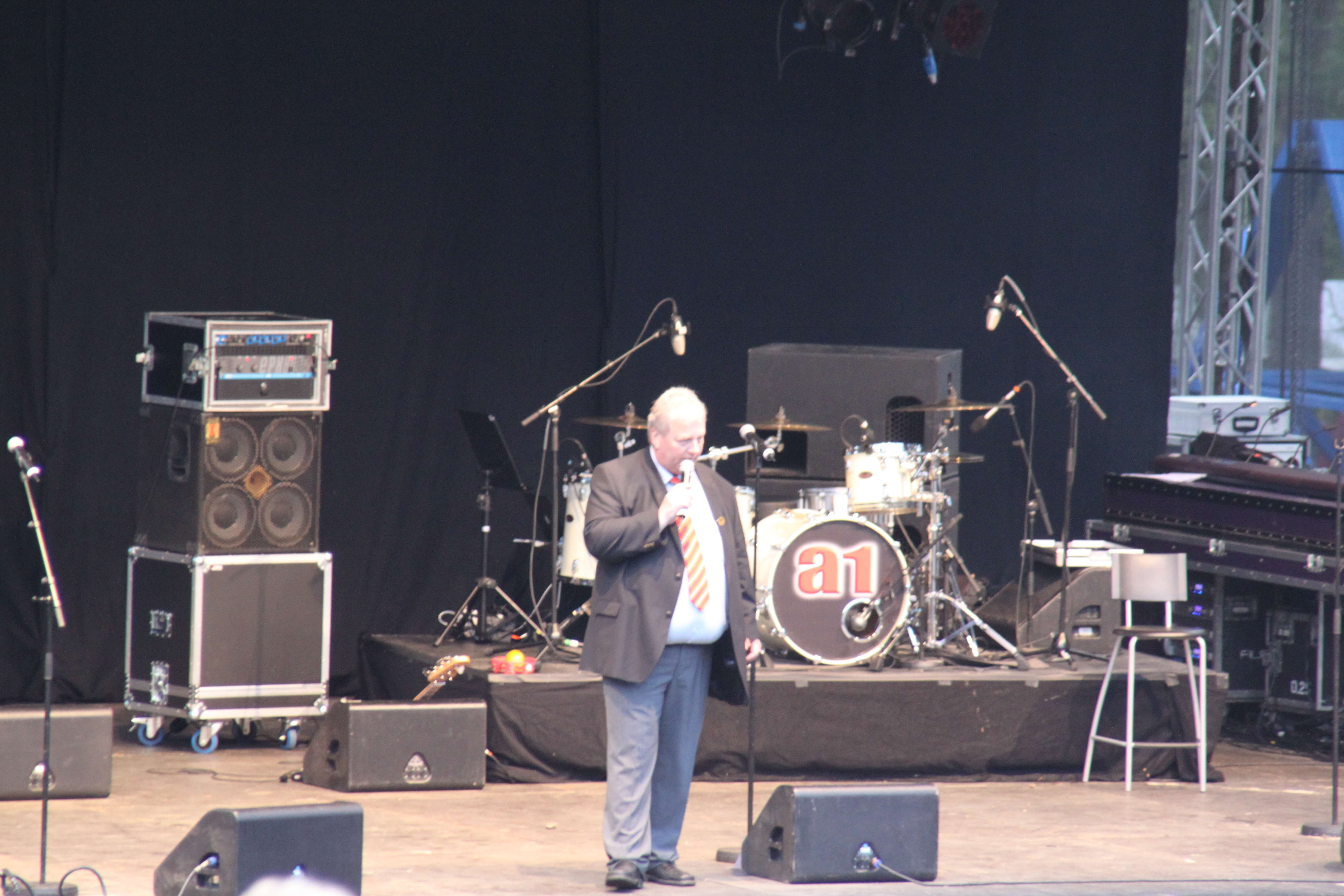 Styreleder Arild Johansen introduserer popgruppa A1 under Tønsbergmessa 2010